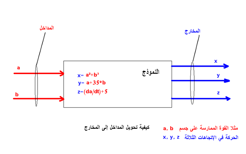 الأسس الرياضية للسِبرانية.